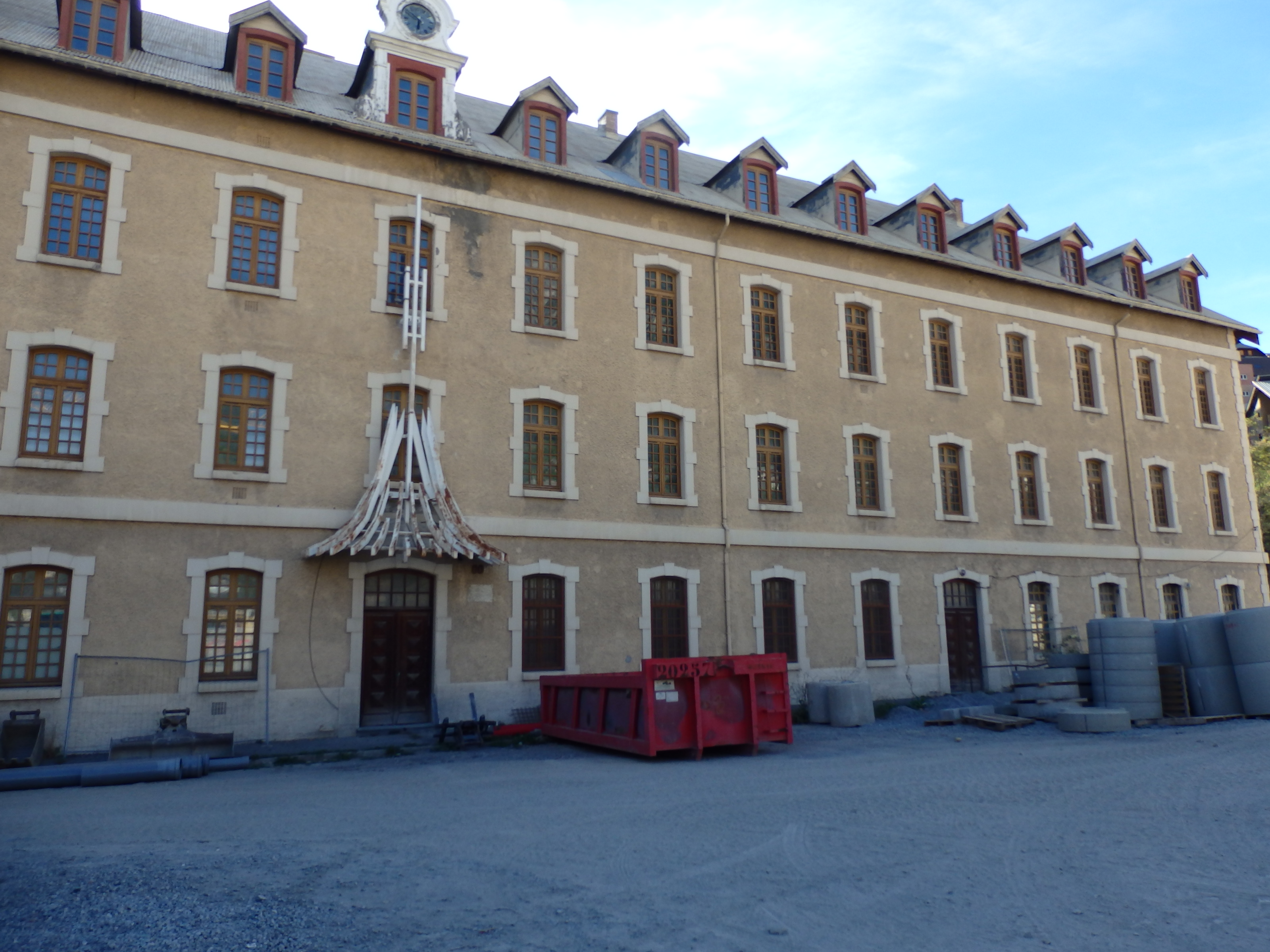 Briançon Coeur de Ville ancienne caserne